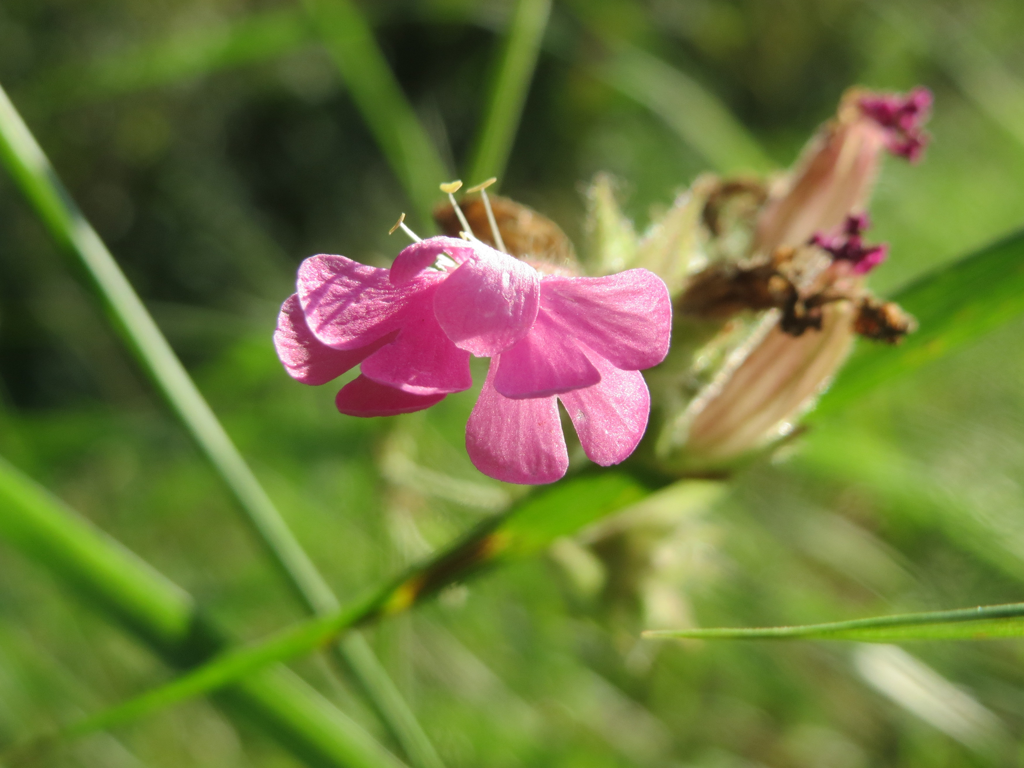 Rote Lichtnelke (Silene dioica) am Hardtgraben im Schwetzinger Hardt